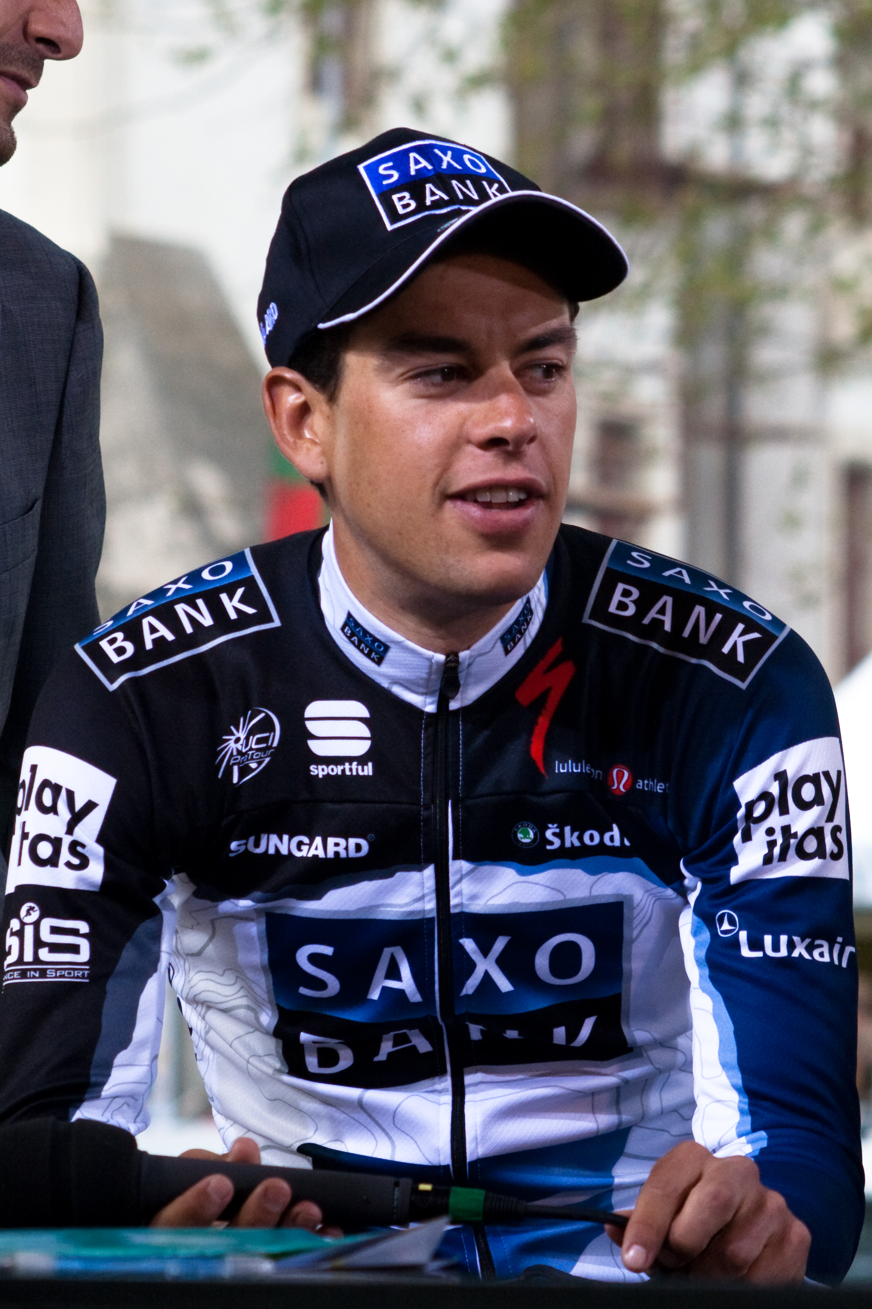 Richie Porte sur le plateau télé de la TSR à l'issue de la troisième étape du Tour de Romandie 2010 à Moudon.